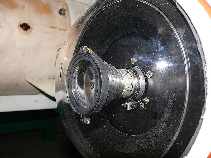 AGM-65B Optik, eigenes Bild